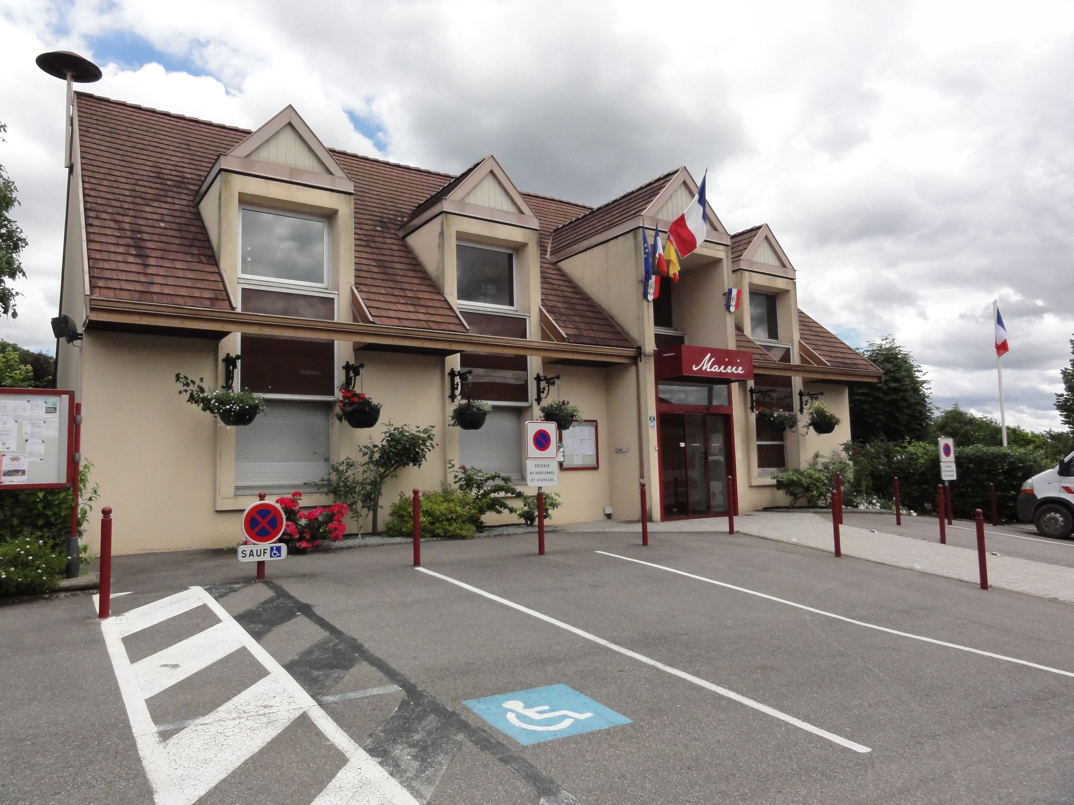 Richardménil (M-et-M) mairie